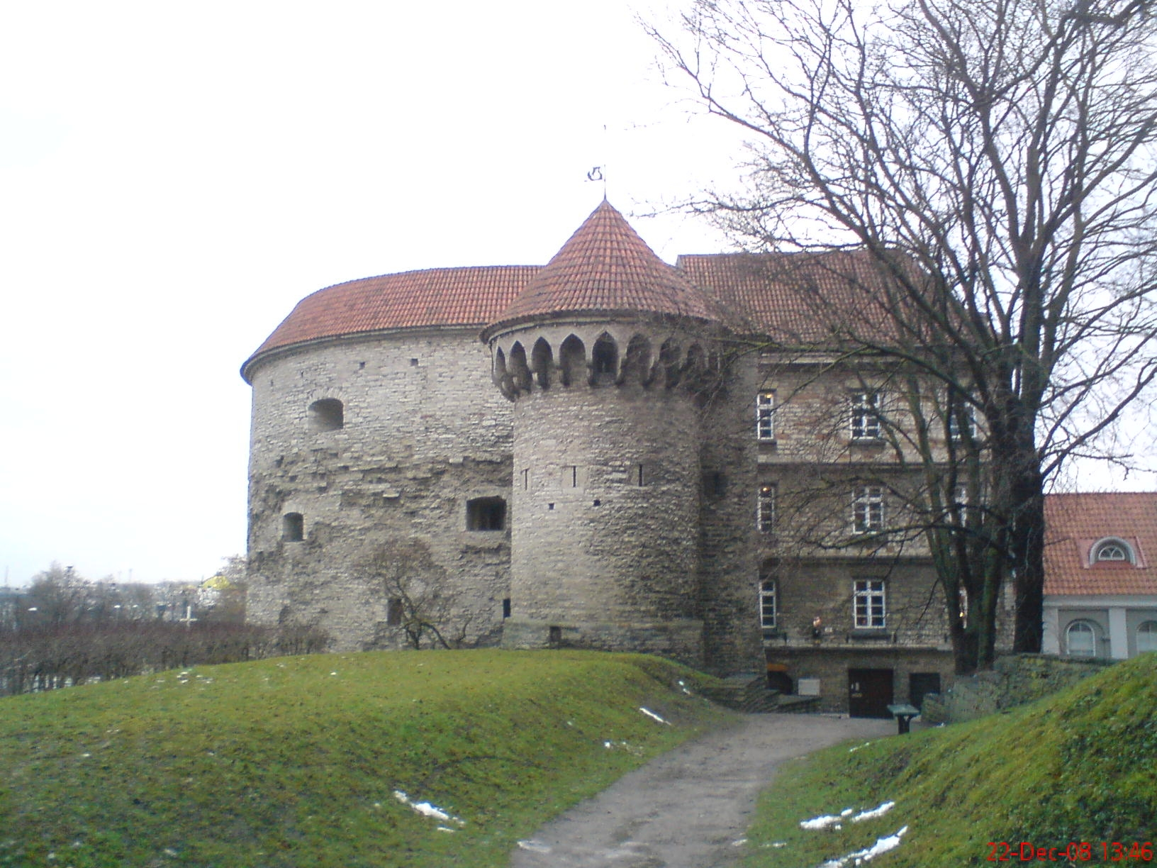 Tallinna linnamüüri Suure Rannavärava kaitsetornid, vaade Suure Rannavärava bastionilt